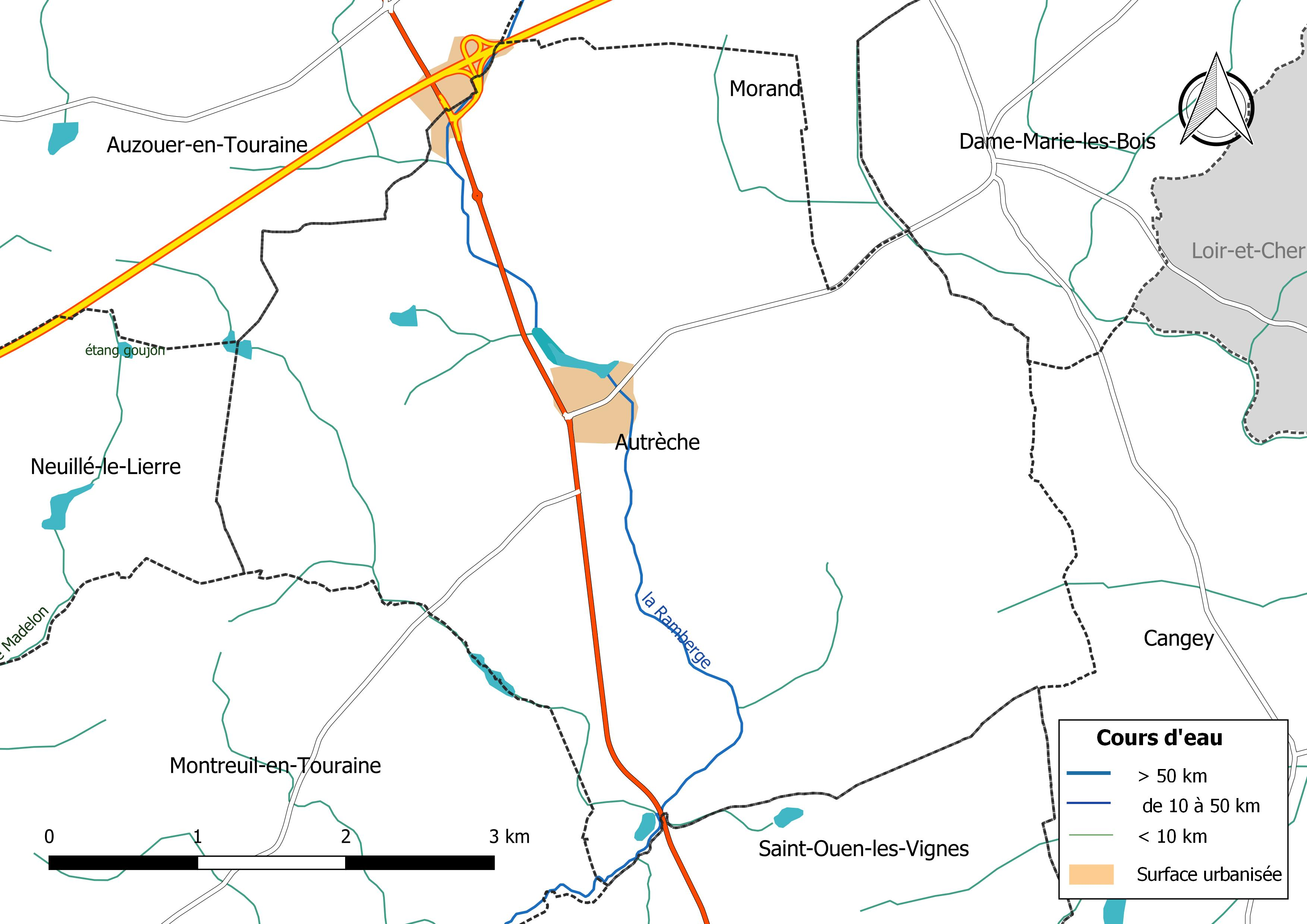 Carte du réseau hydrographique de la commune de Autrèche (France).